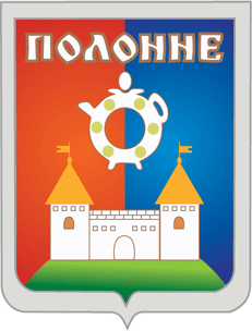 Герб міста Полонне